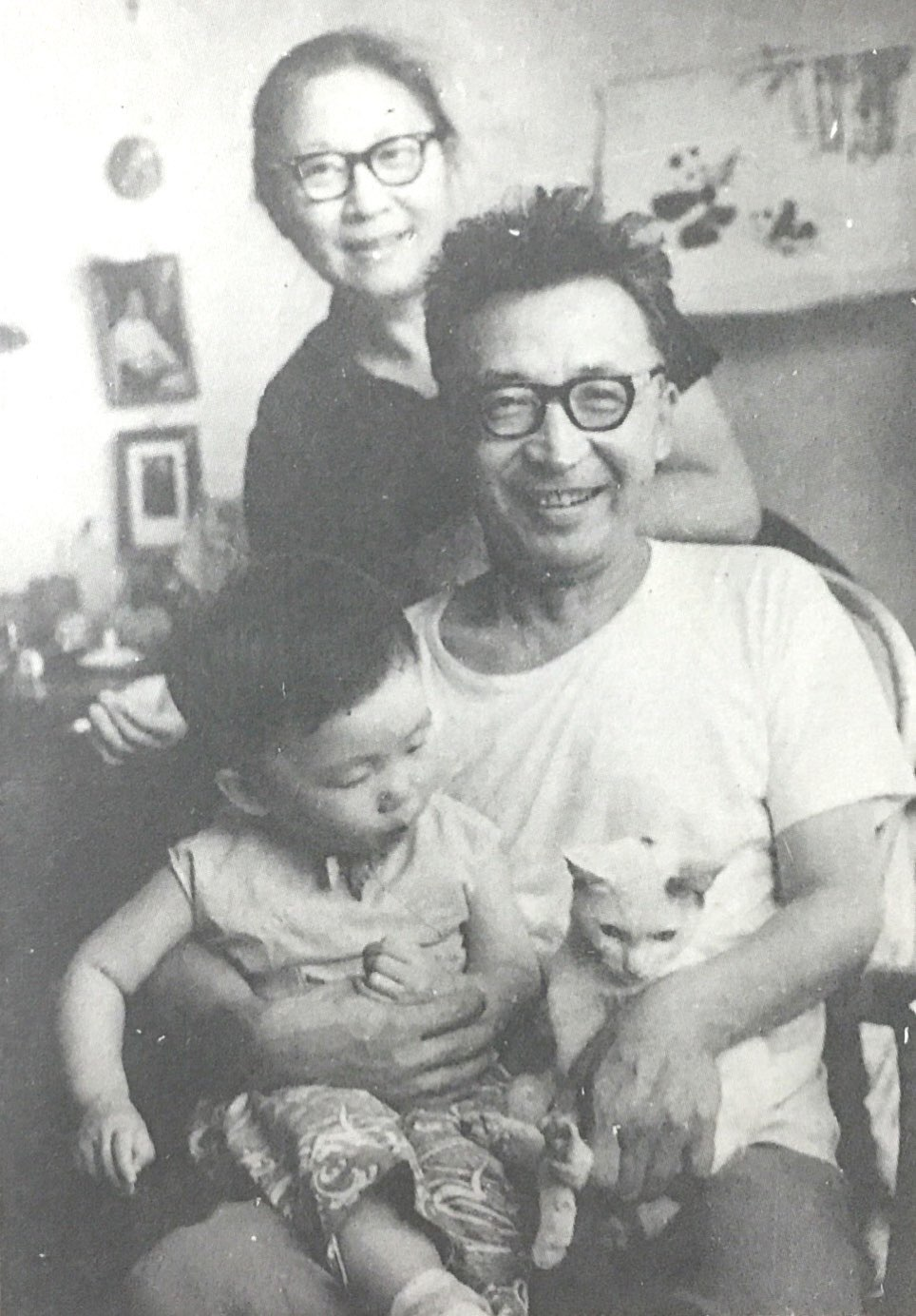 李克異写真⑤